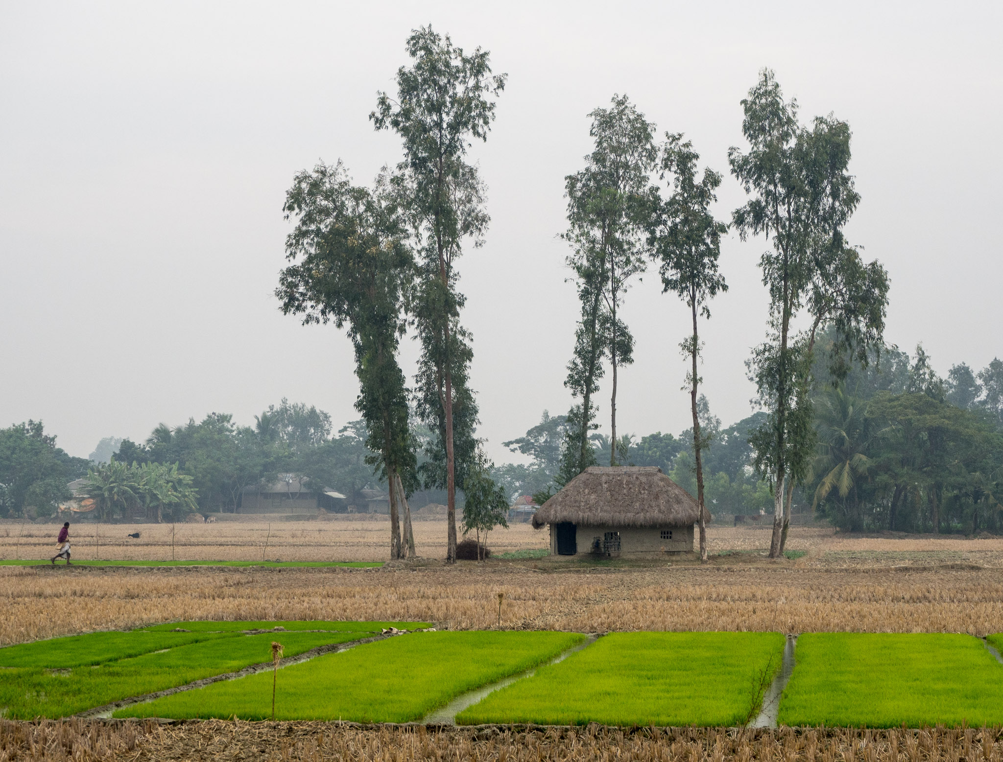 Village Fields